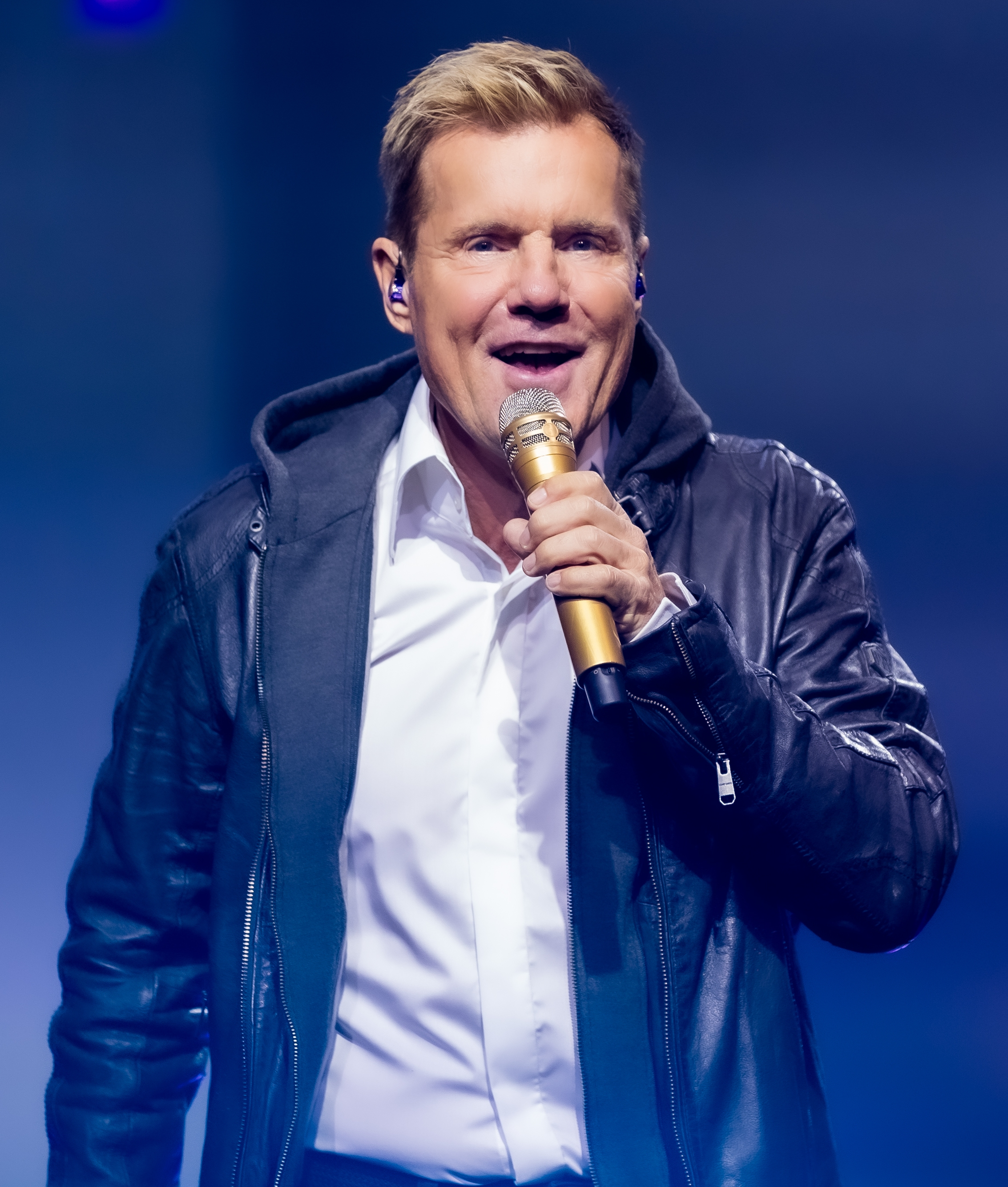 Dieter Bohlen during Dieter Bohlen - Die Mega-Tournee 2019 at SAP Arena, Mannheim, Baden-Württemberg, Germany on 2019-10-05, Photo: Sven Mandel